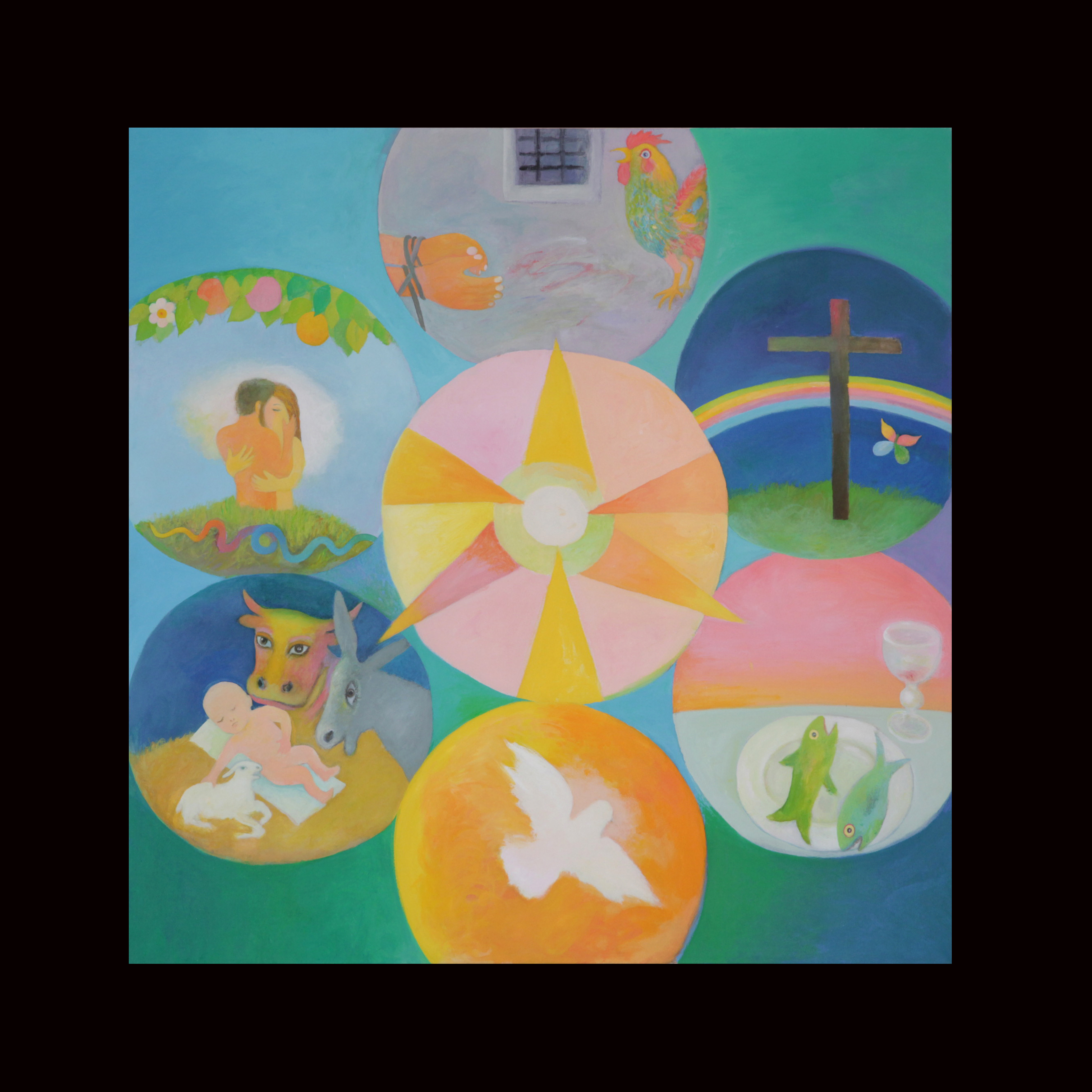 Meditationsbild von Max Rüedi in der Römisch-katholischen Kirche Bruder Klaus Zürich